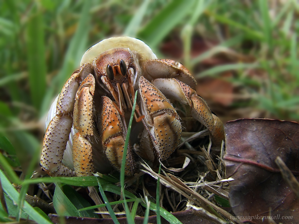 a beautiful specimen of Coenobita variabilis